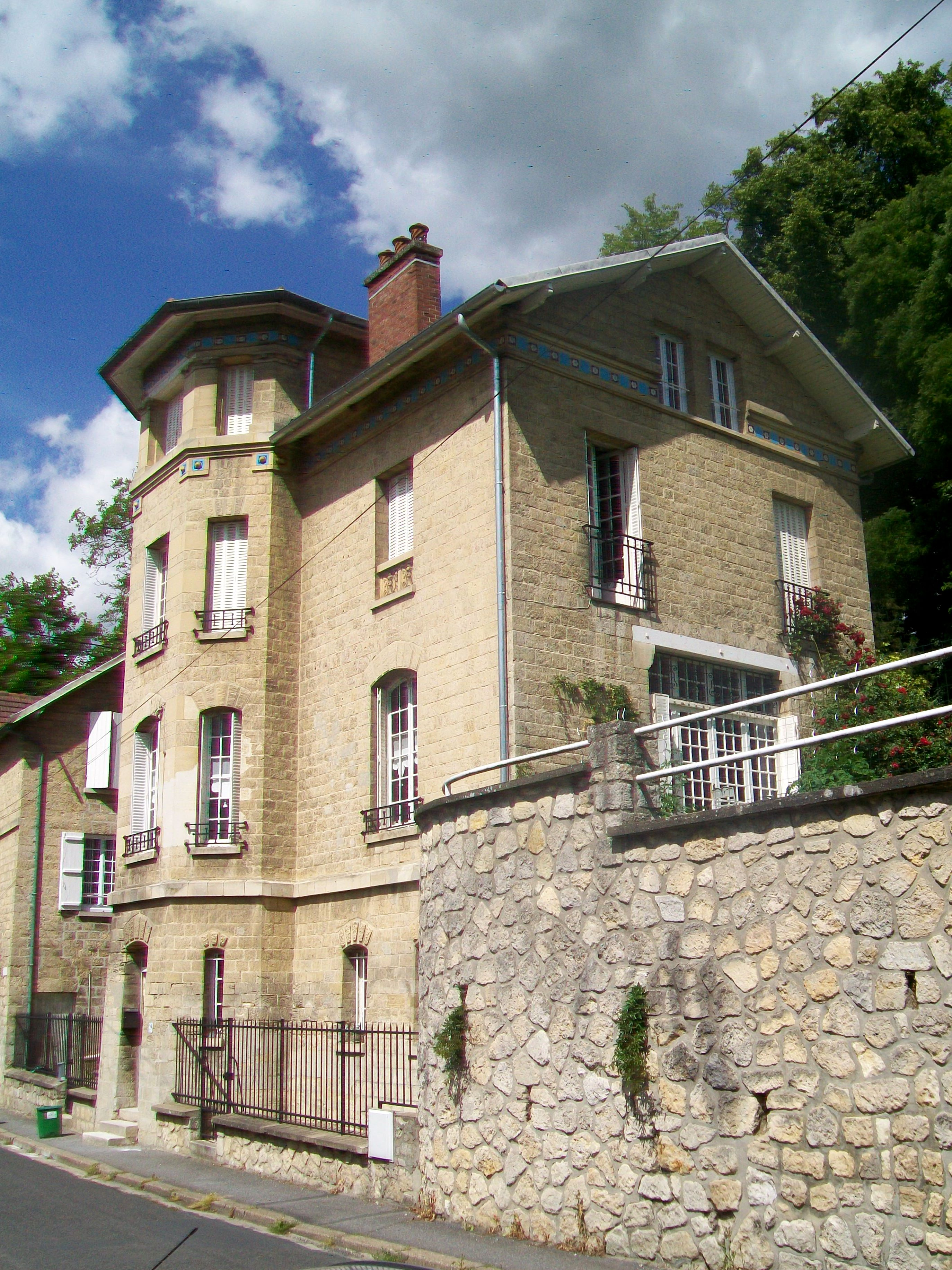 Le clos Patrix, maison natale de Claude Viseux, 22 rue d'Aire.